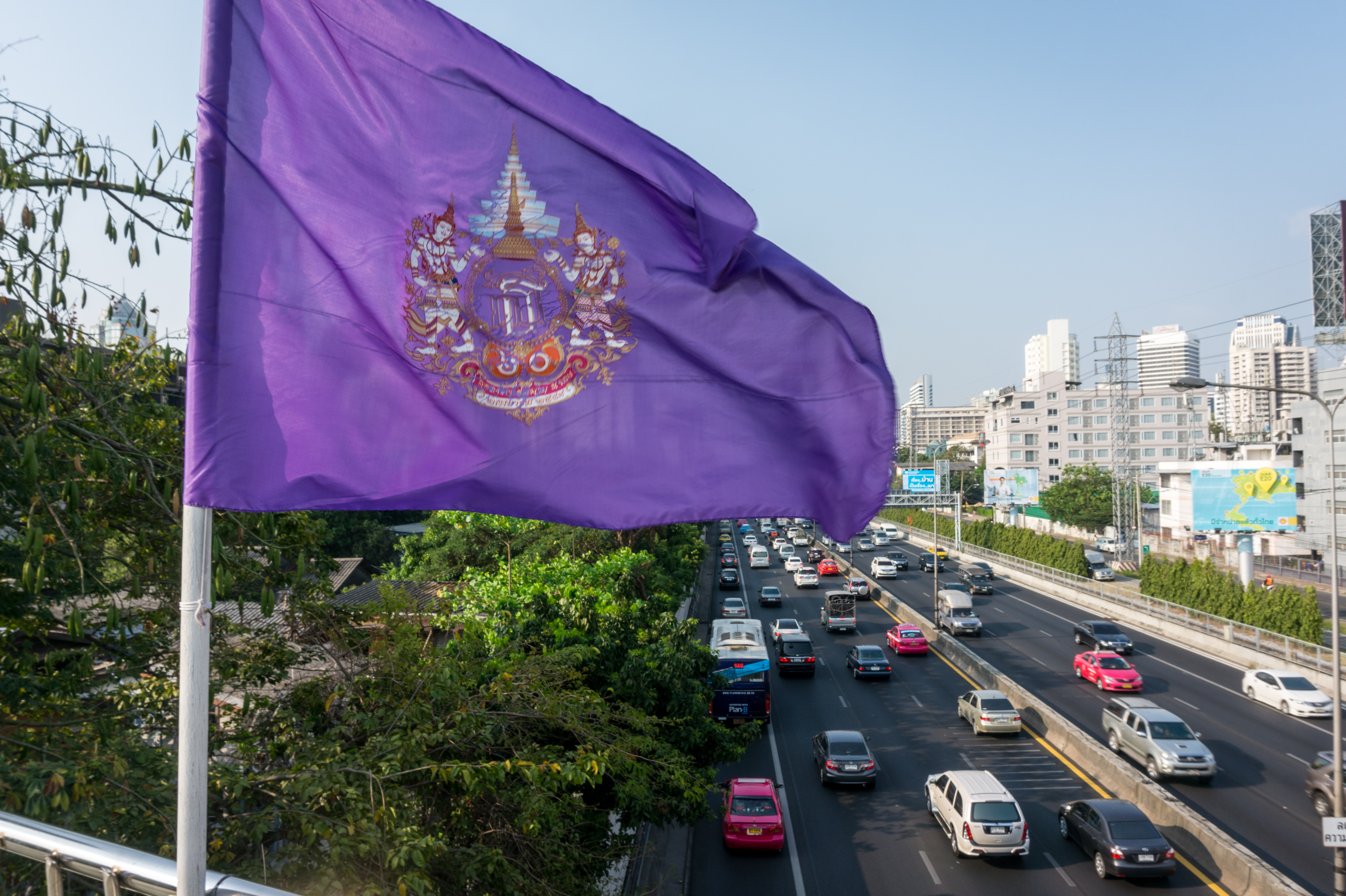 Highway